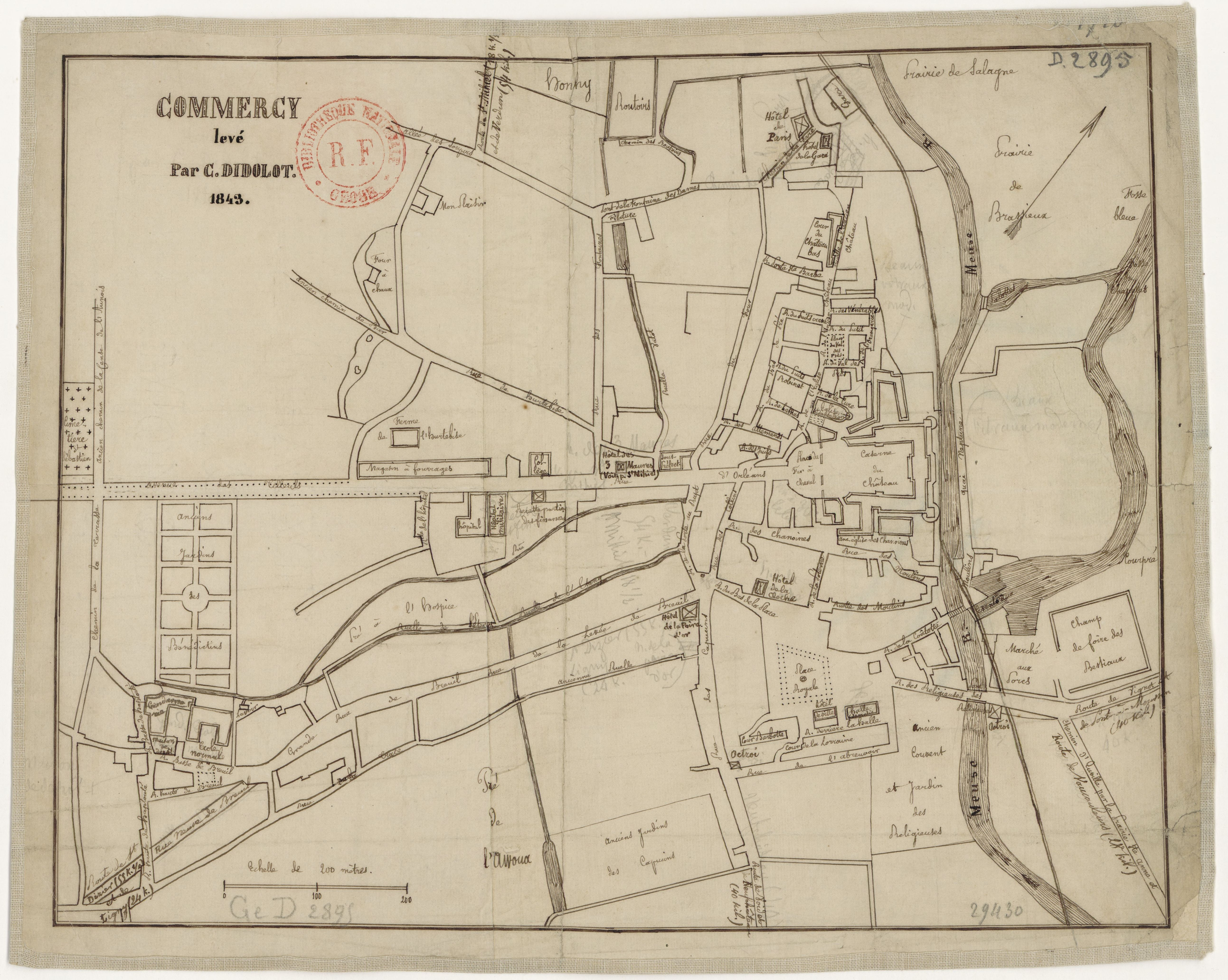 Commercy / levé par C. Didolot